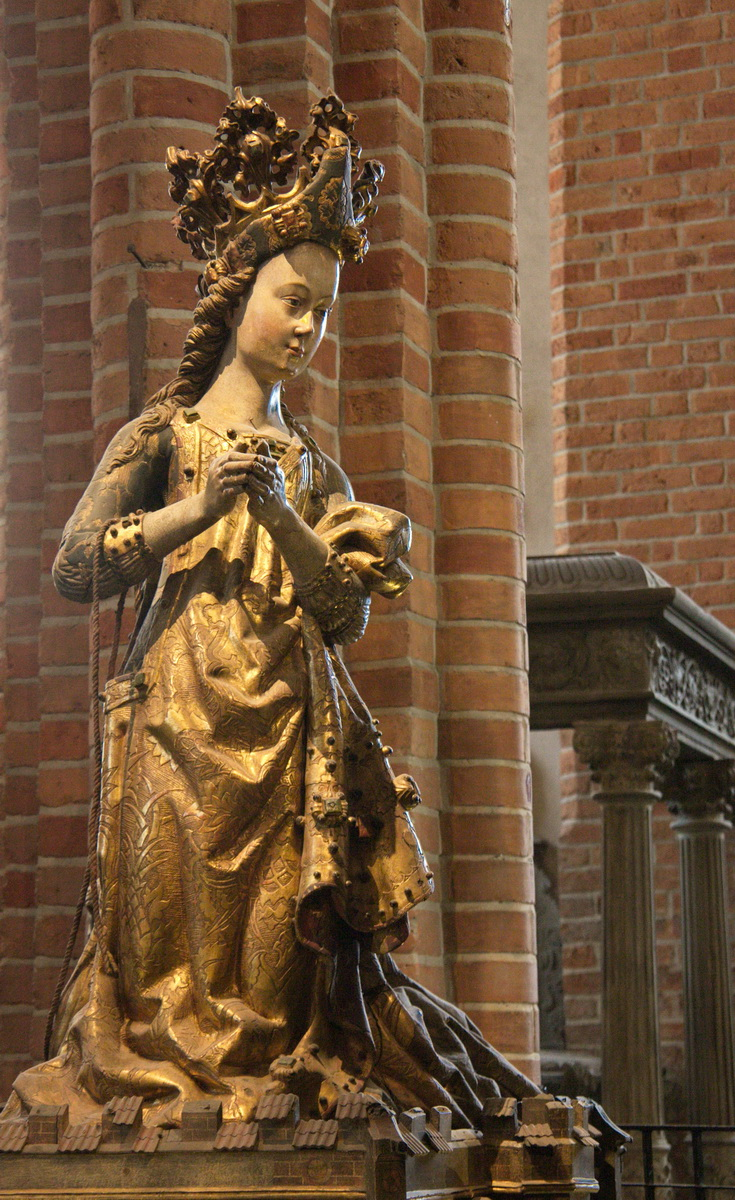 Princesa del conjunt escultòric de Sant Jordi i el Drac